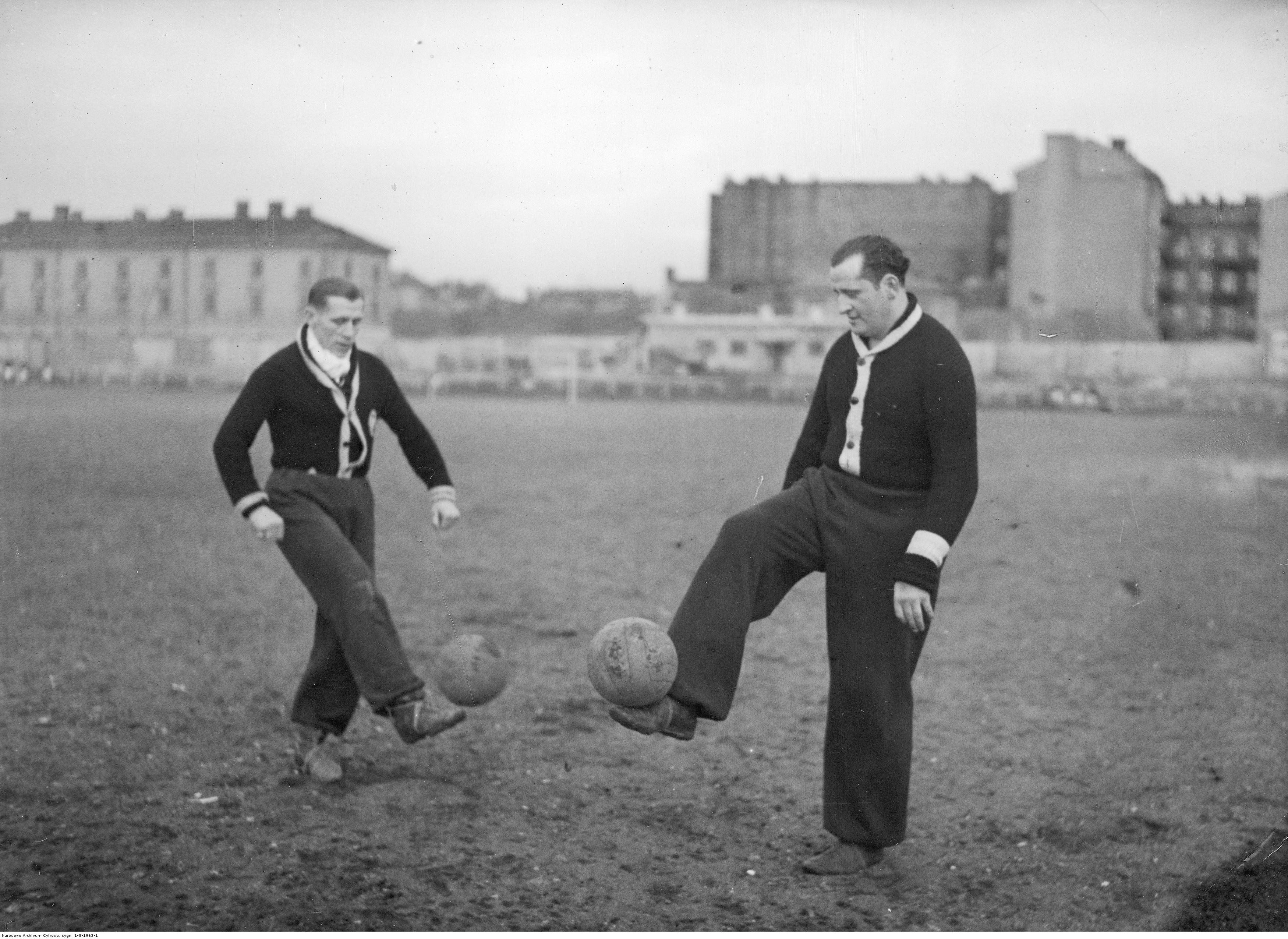 Trener klubu sportowego Polonia Warszawa Karol Kossok (z prawej) i piłkarz Szczepanek podczas treningu.